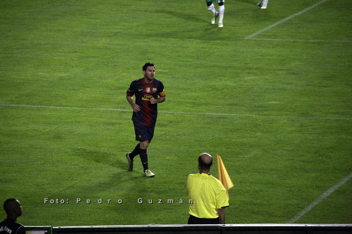 Leo Messi against Raja Casablanca